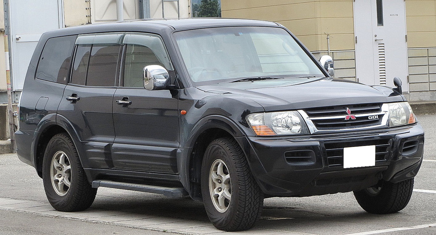 三菱 パジェロ ロング EXCEED-S